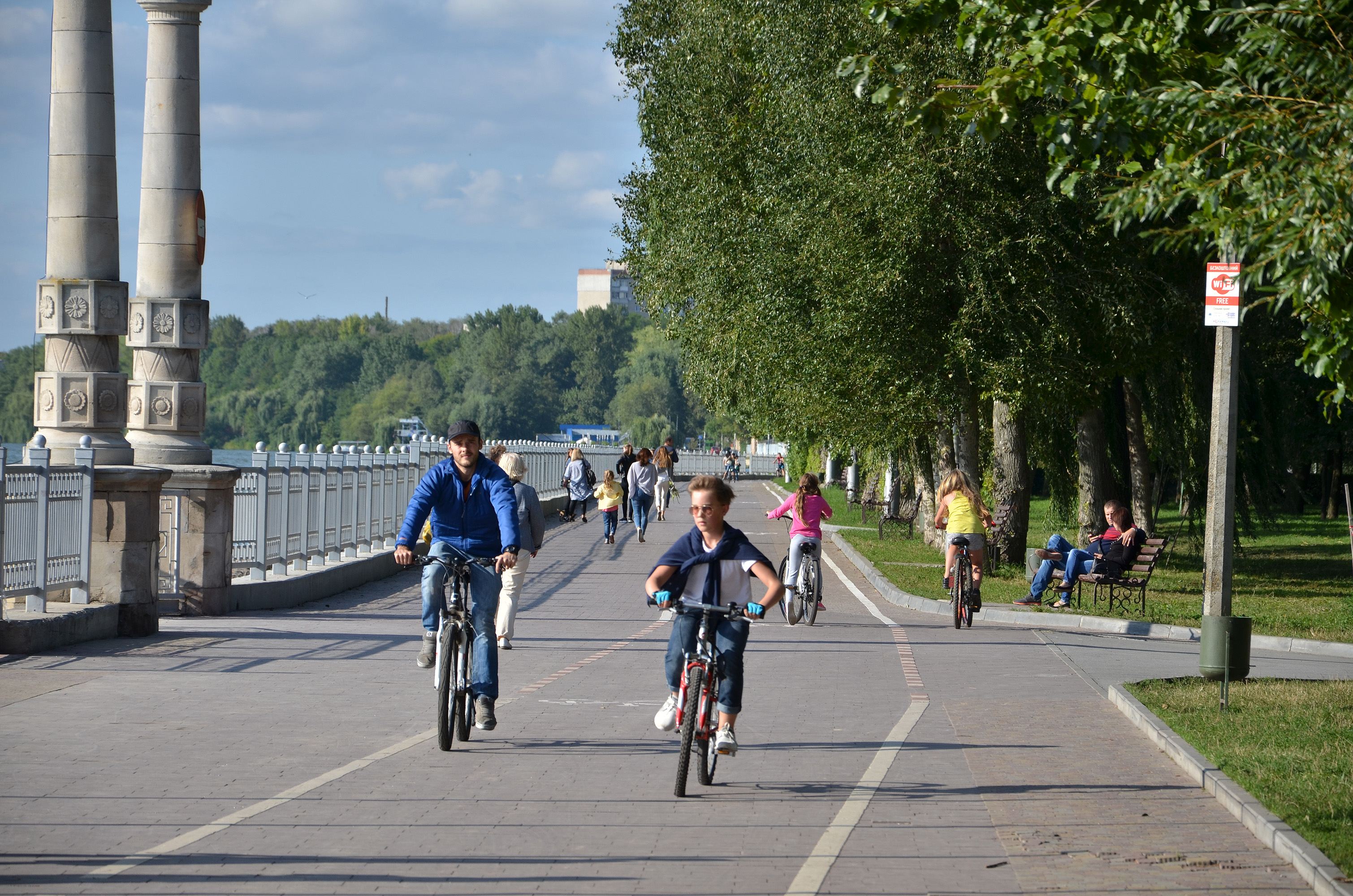 Тернопільські велосипедисти на велодоріжці в парку імені Тараса Шевченка.